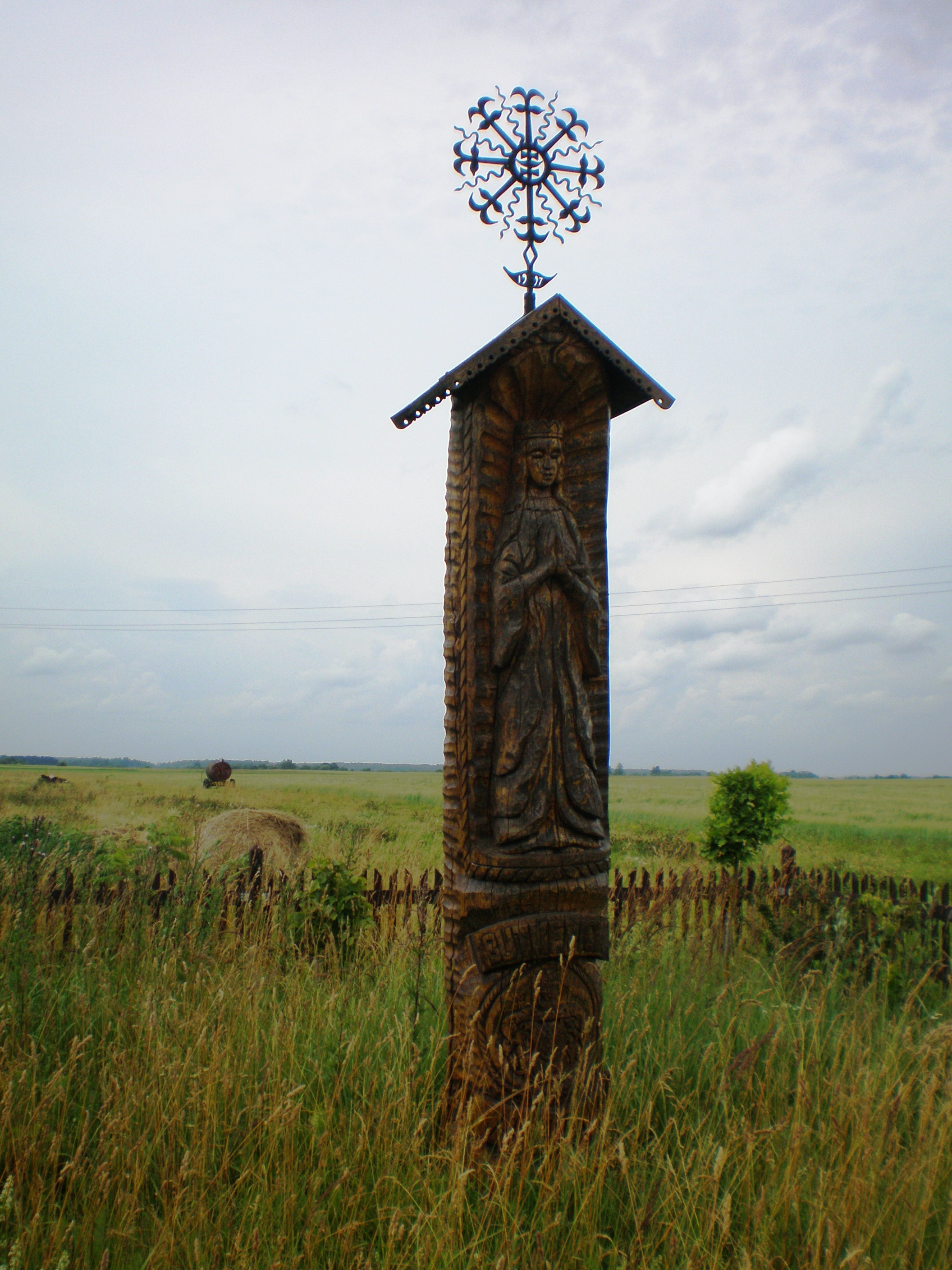 Liaudies architektūros paminklas su baltišku kryžiumi Angiriuose, Kėdainių raj.